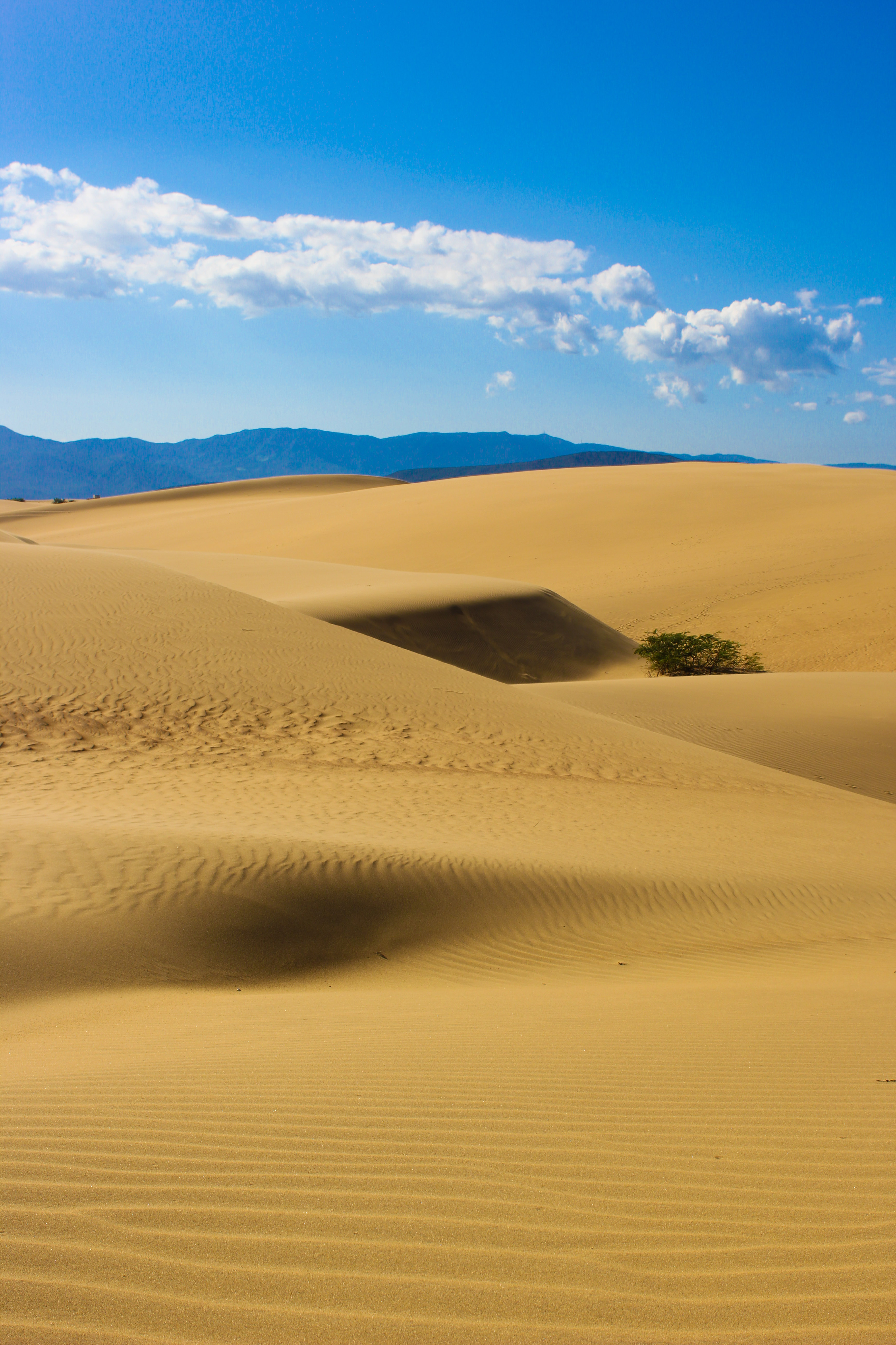 Medanos de Coro, Edo. Falcón